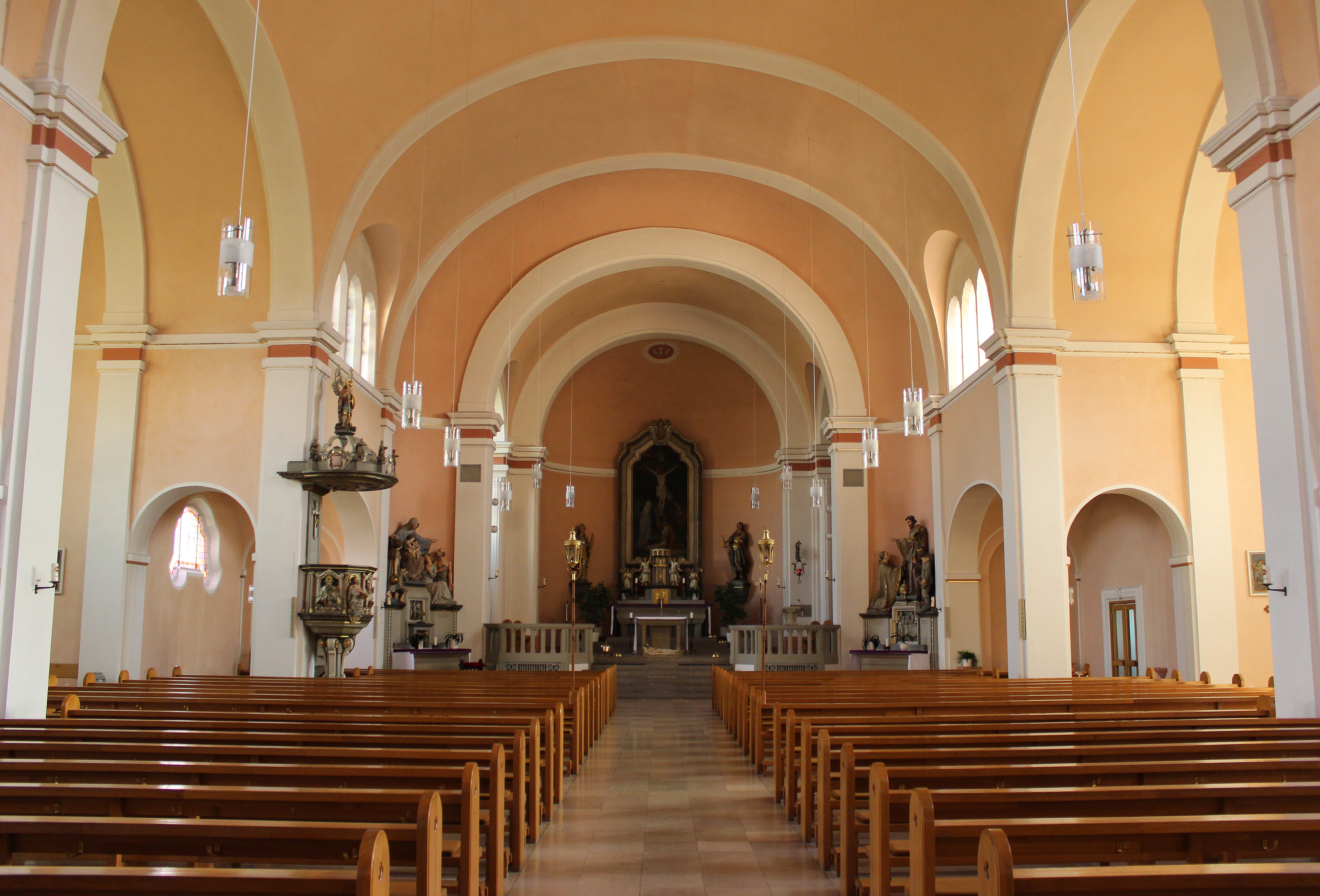 Blick is Innere der katholischen Pfarrkirche St. Mauritius in Haustadt, einem Ortsteil der Gemeinde Beckingen, Landkreis Merzig-Wadern, Saarland